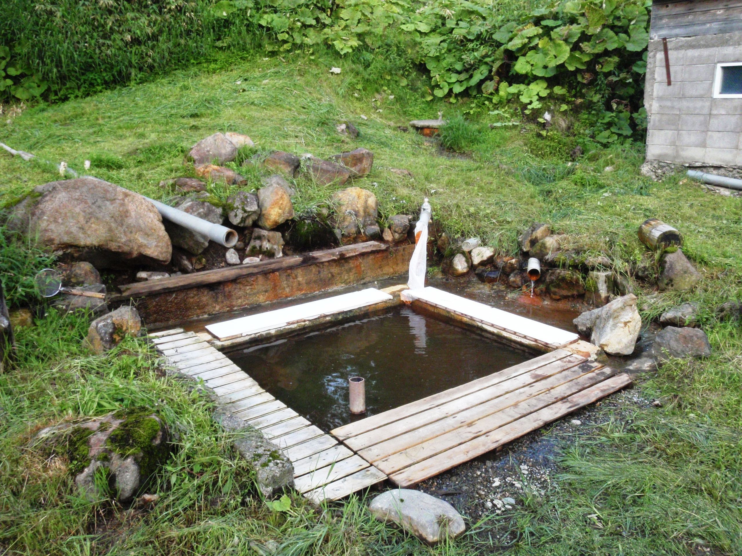 愛山渓倶楽部横に設置されている無料足湯